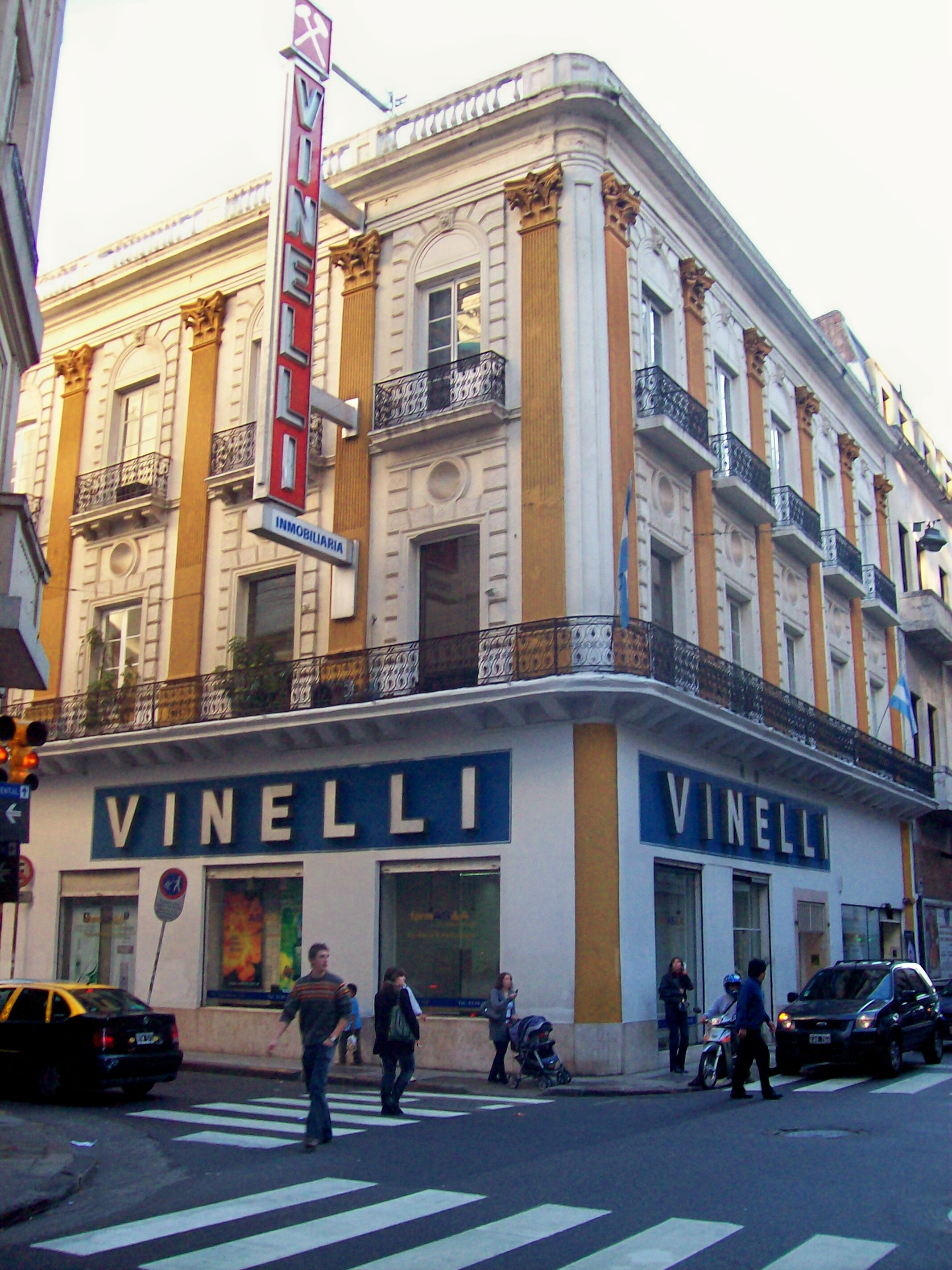 Esquina sin ochava en Hipólito Yrigoyen y Chacabuco, Buenos Aires. Foto desde esq NE a SO. Se trata de la antigua residencia de Esteban Rams, comerciante catalán, obra del ingeniero Edward Taylor (ca. 1865)